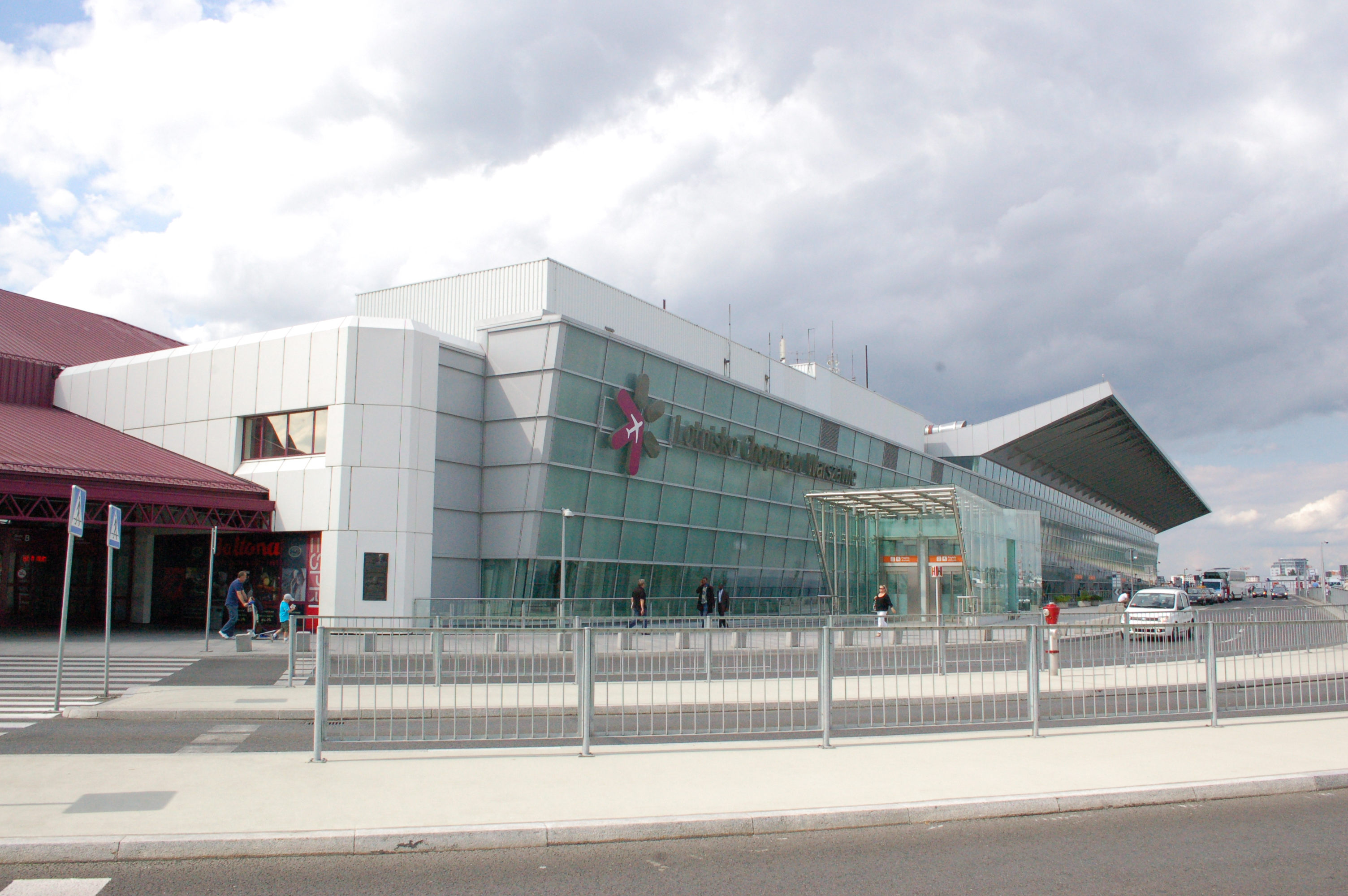 Warschau Flughafen Okecie